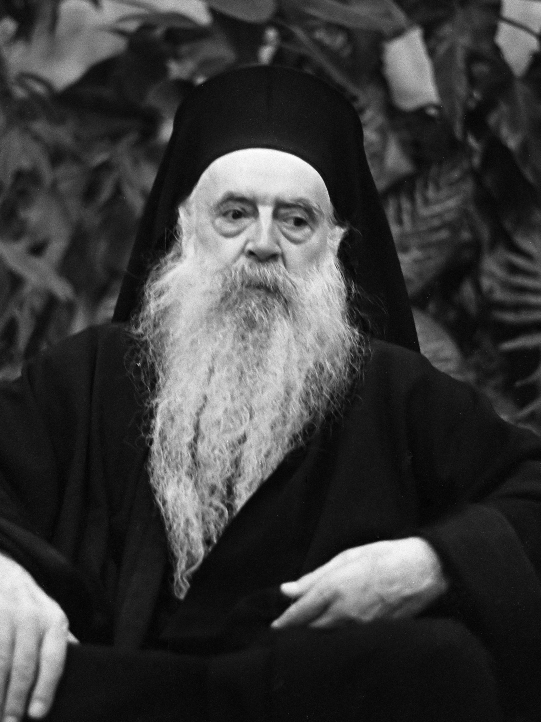 Aankomst Patriarch Athenagoras op Schiphol samen met Griekse reder Onassis 25 oktober 1967